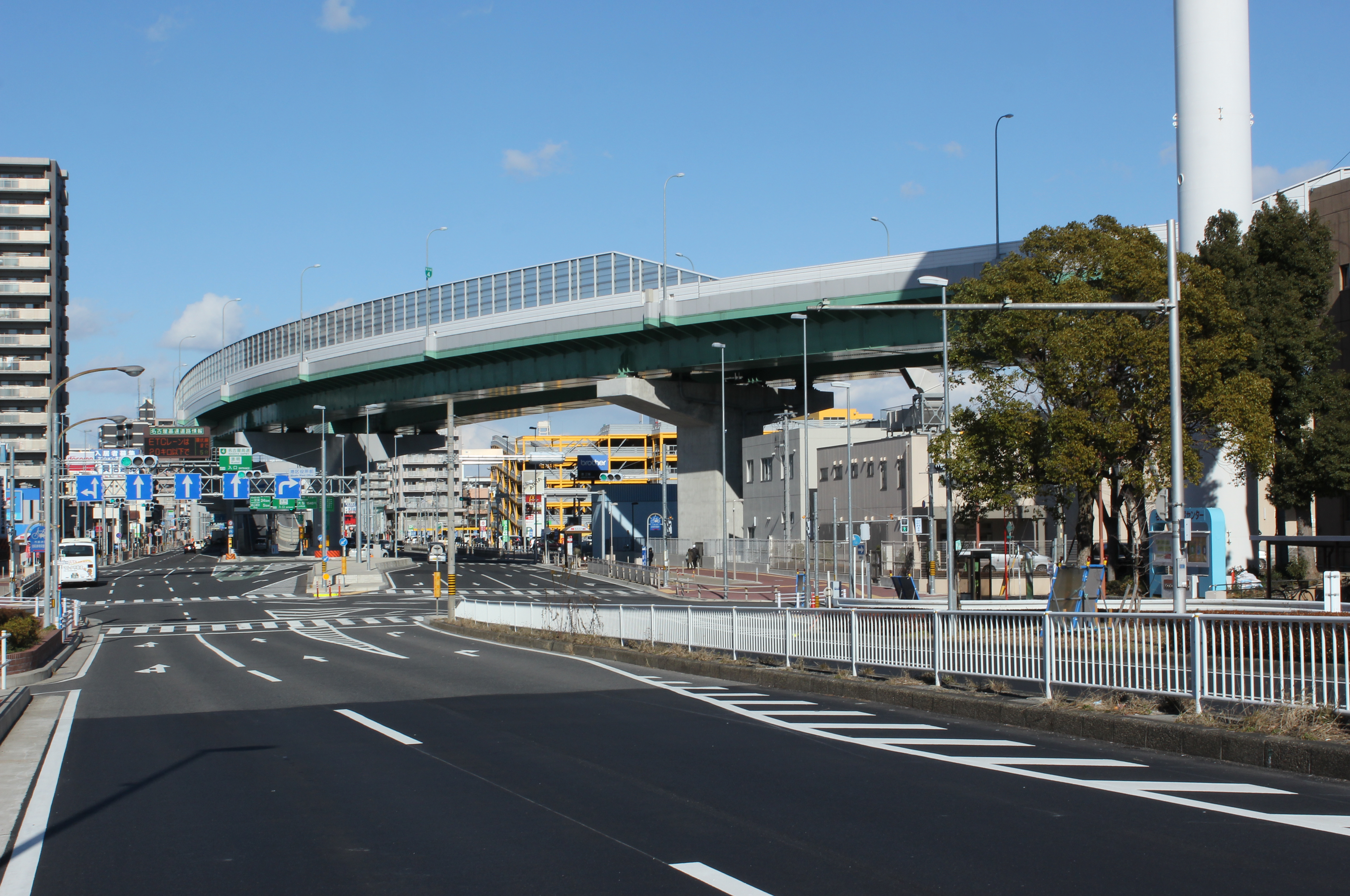 名古屋市道江川線から見る名古屋高速4号東海線港明出入口付近